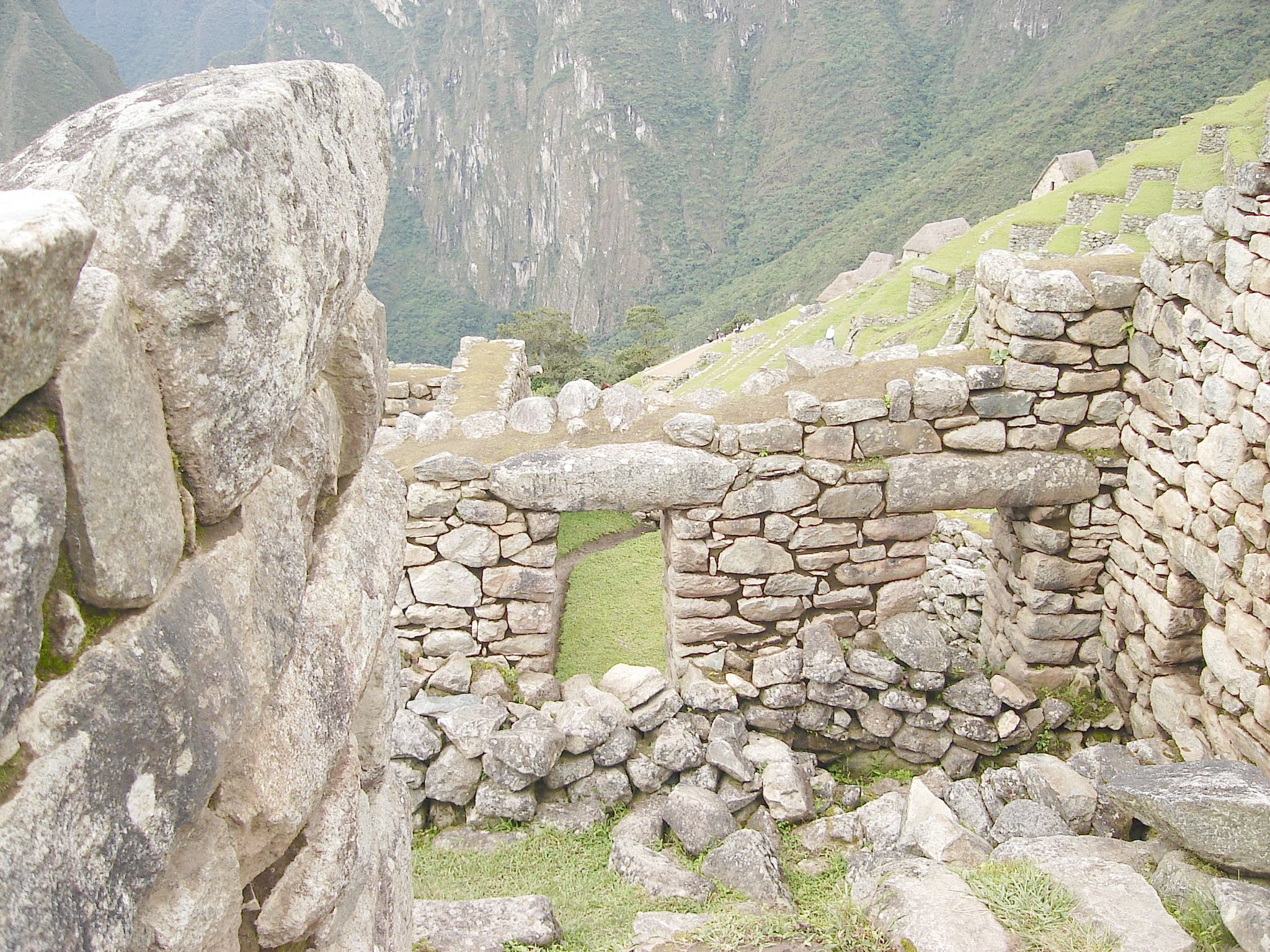 Foto tirada por mim, em Machu Picchu.